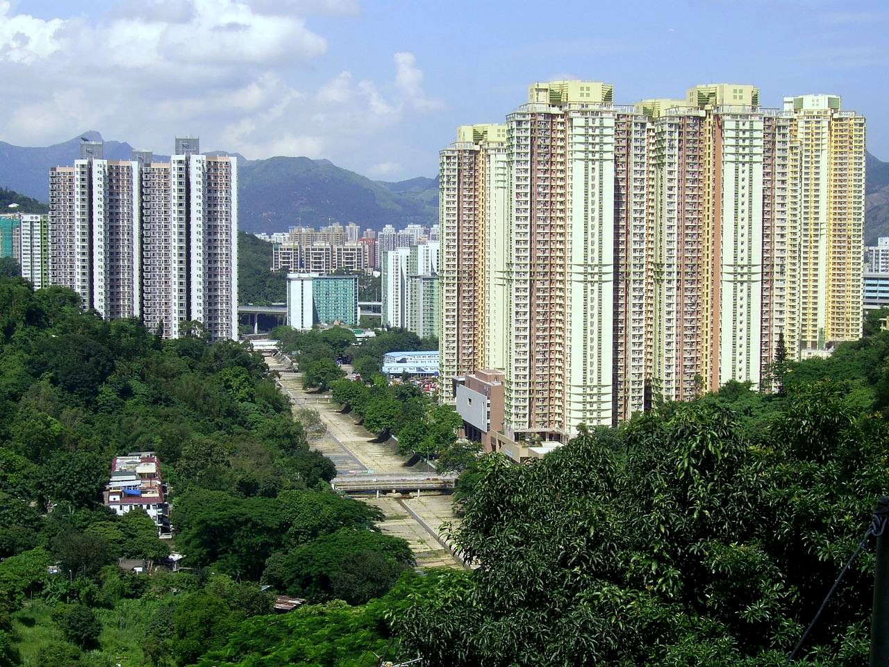 中文（香港）: 城門河上游